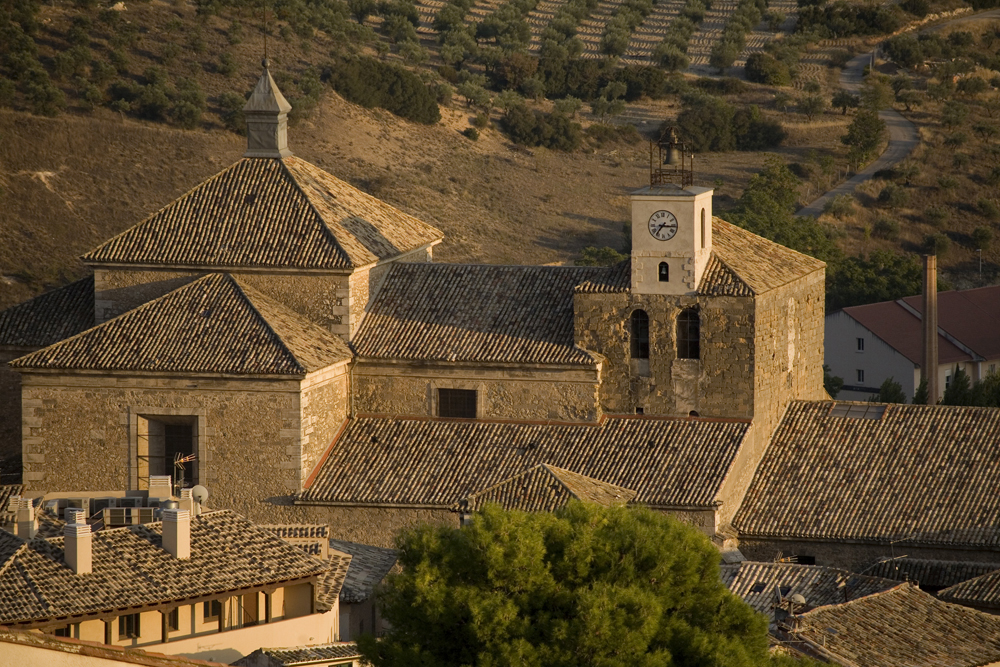 Colegiata de Pastrana, España.